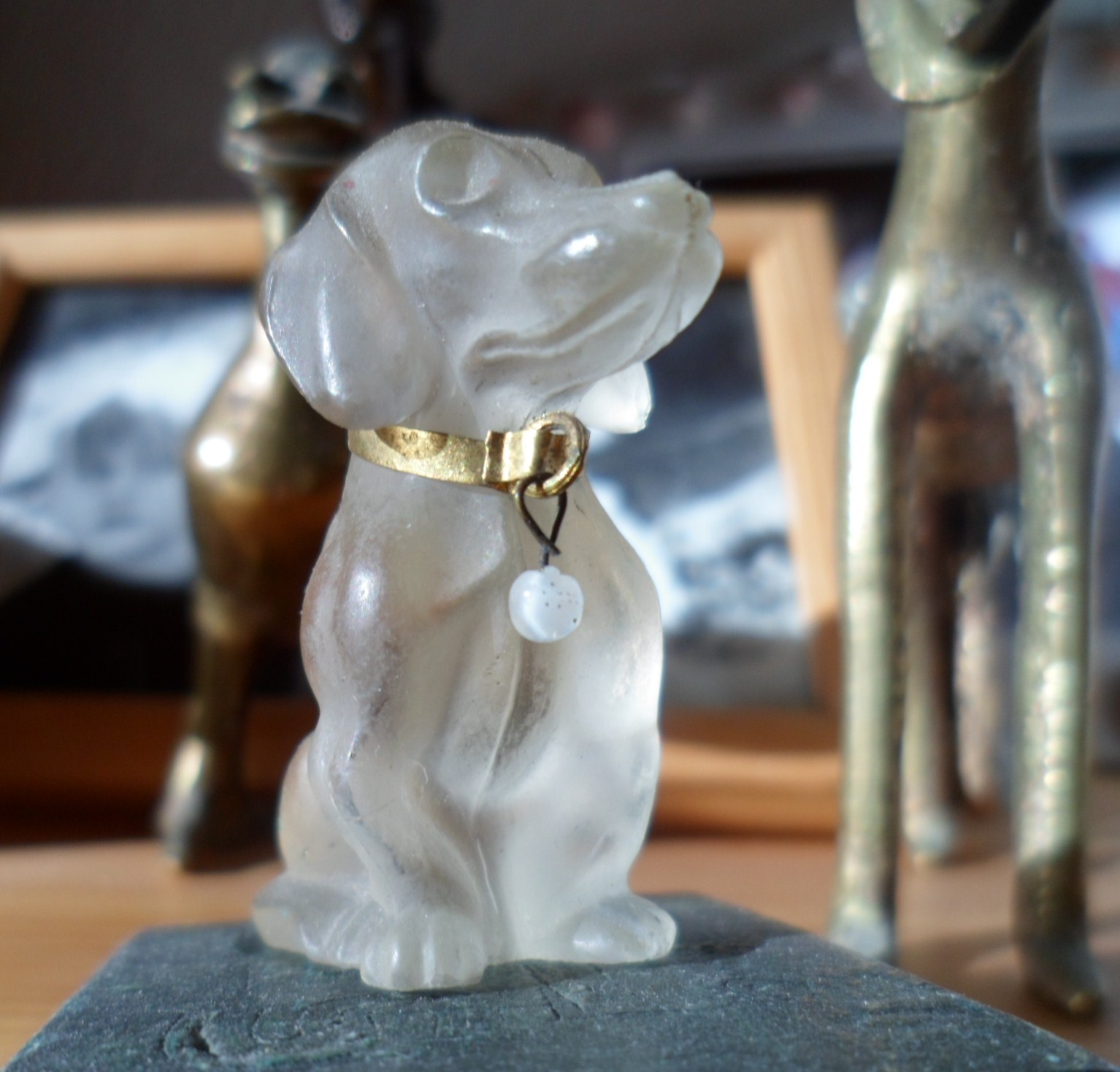 Bric-à-brac